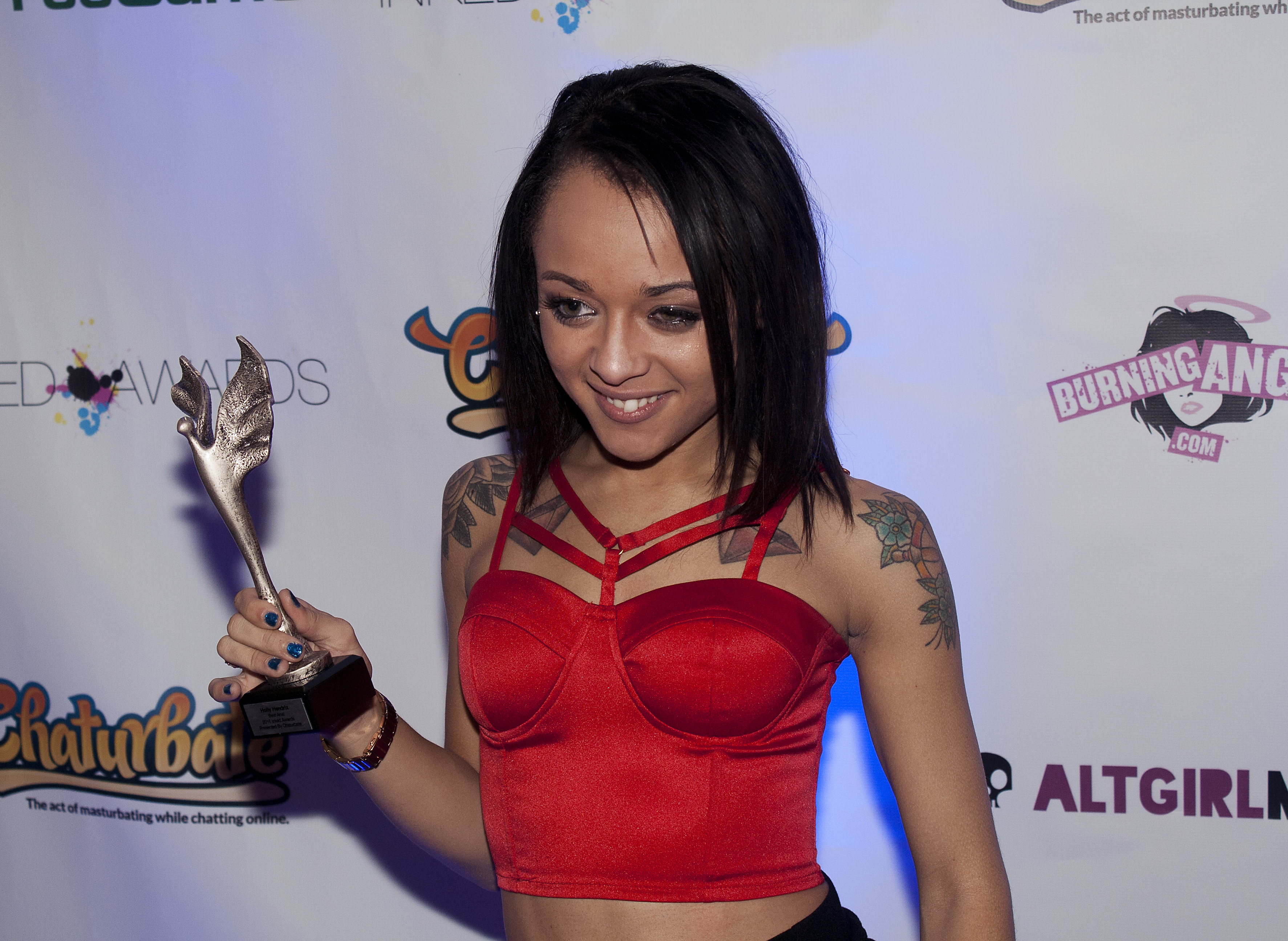 Exxxotica2016_0172bas